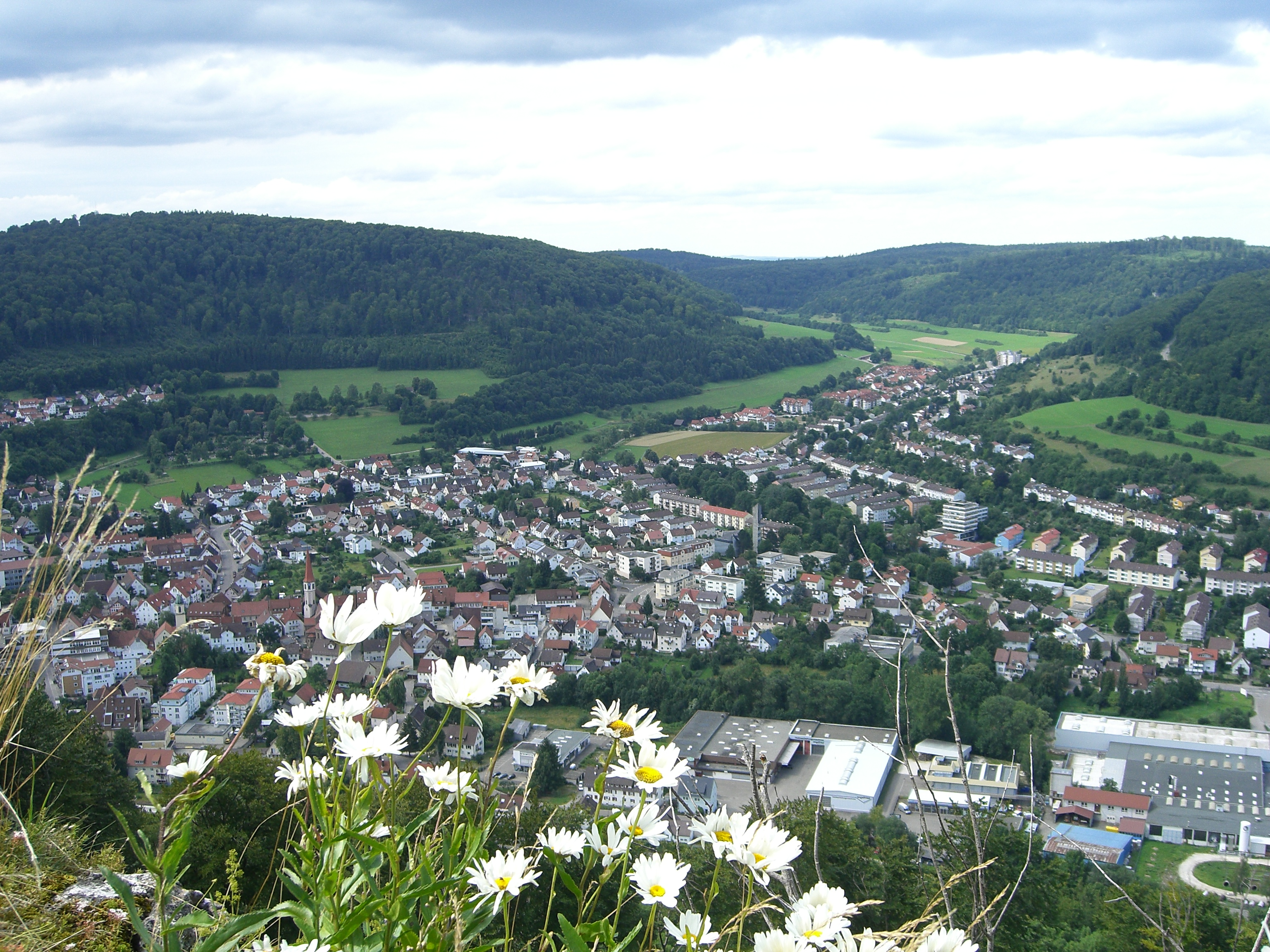 Oberkochen vom oberen Rotstein